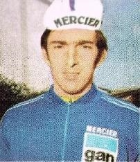 Michel Perin (1972), 'Sprint 72', Panini figurina n°102.